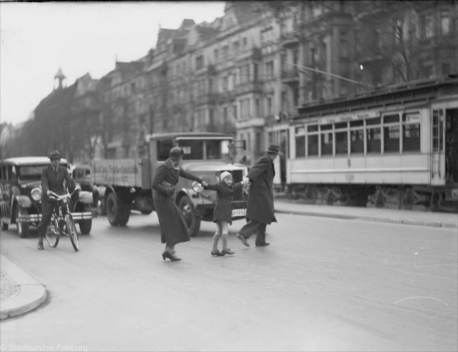 Familie überquert den Kurfürstendamm.